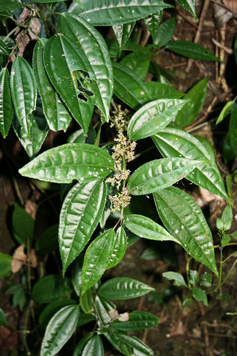 Pilea longicaulis, Brennnesselgewächse (Urticaceae) - Vietnam/Việt Nam: S Pa So, Phong Thổ (Prov. Lai Châu)